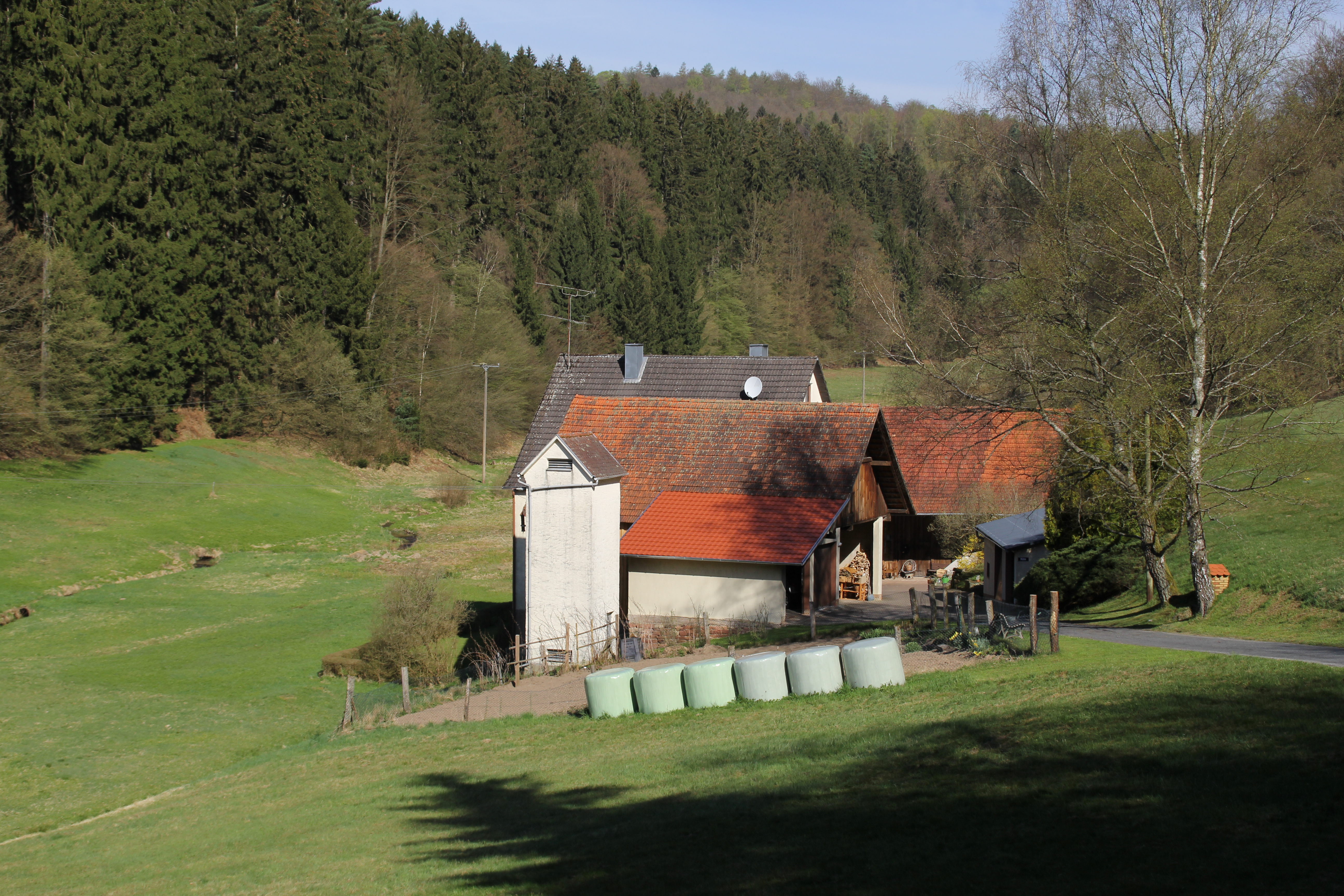 Unterlohrgrund bei Heinrichsthal, Bayern